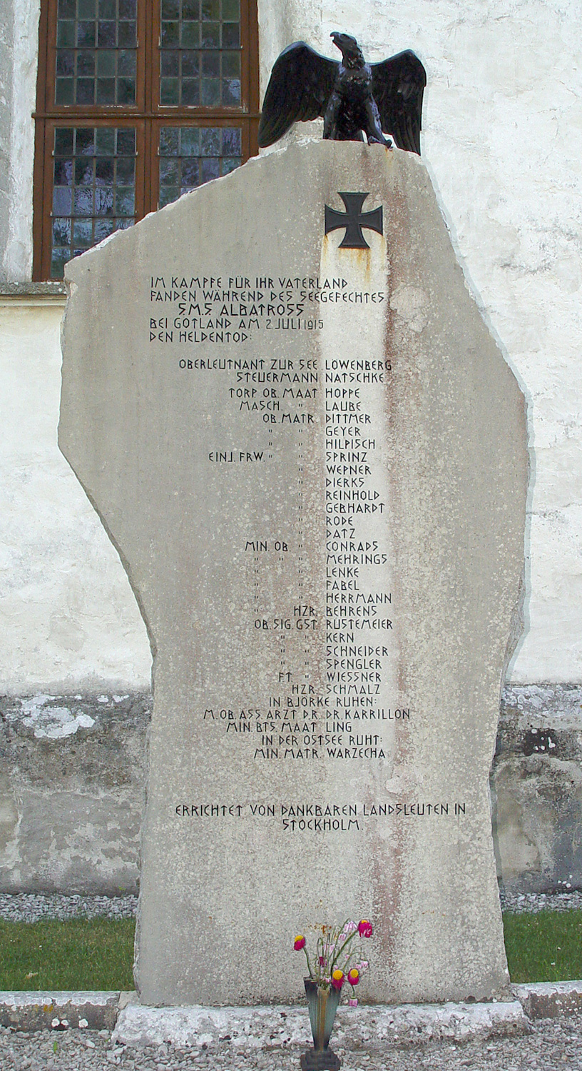 Gedenkstein an die Opfer der SMS Albatross an der Kirche von Östergarn auf Gotland (Schweden)